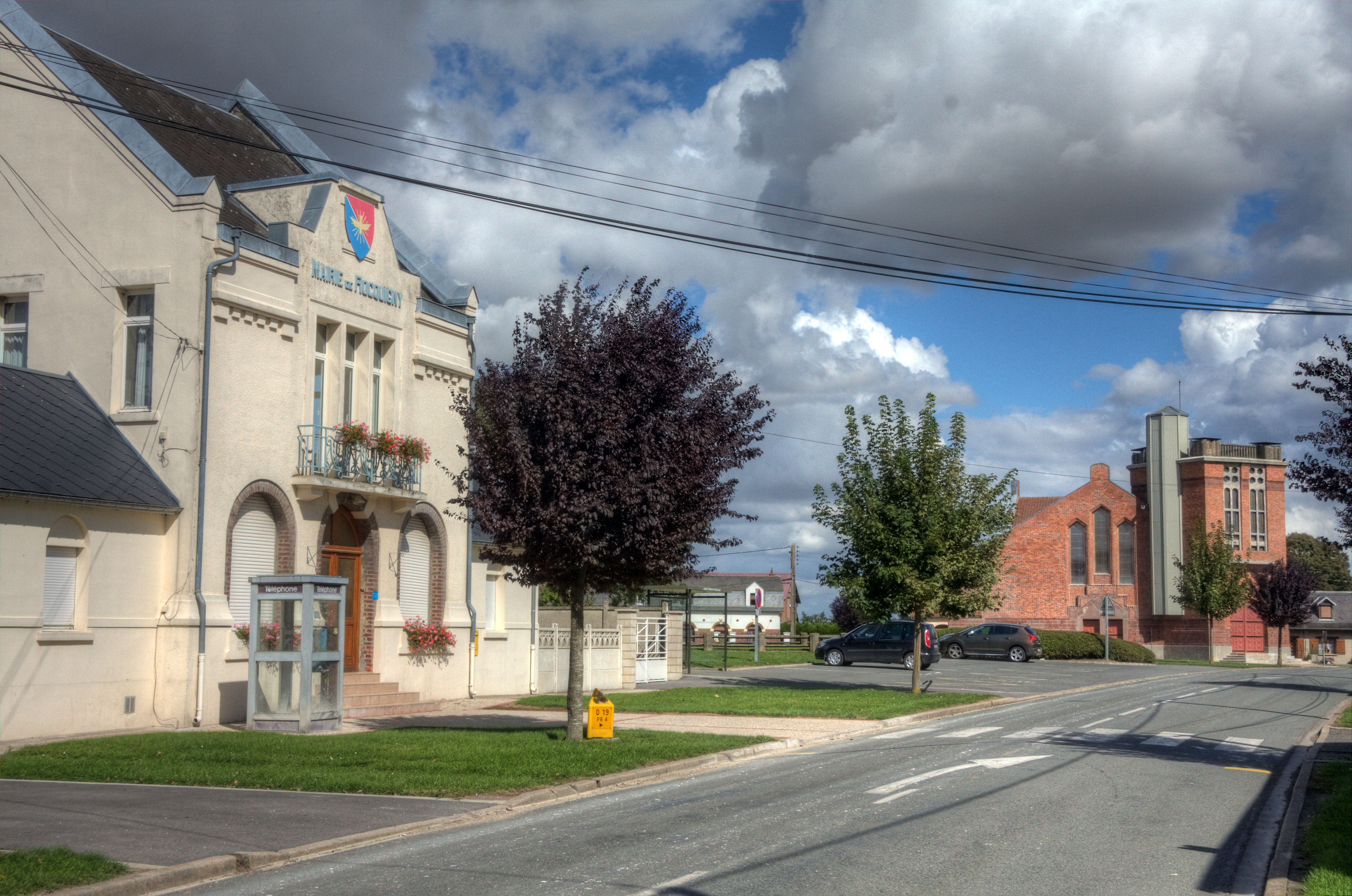 La mairie et l'église de Rocquigny